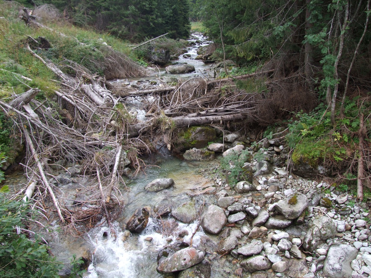 Cicha Woda w górnym biegu (Tatry)